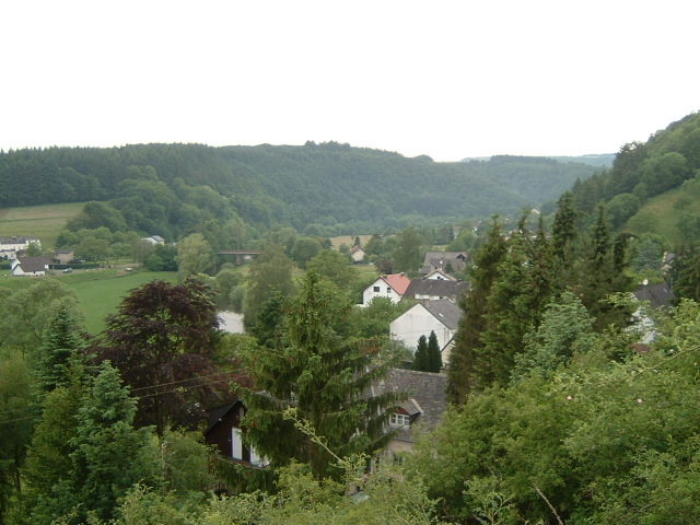 Roth an der Our, (Eifel), im Hintergrund die Brücke über die Our